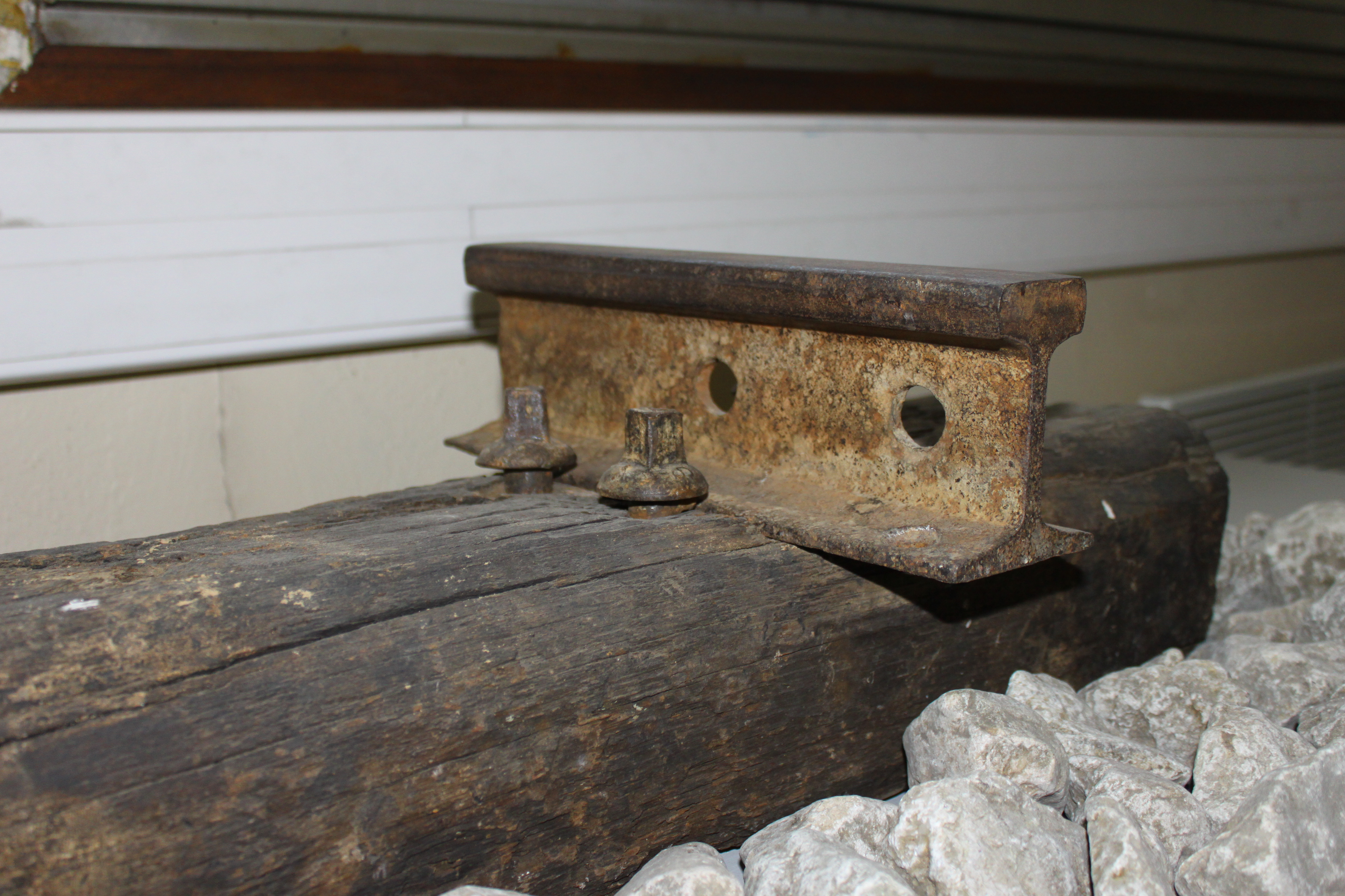 Segment de rail vignole de l'ancien tramway de Grenoble conservé par l'association Standard 216 - Histo Bus Grenoblois